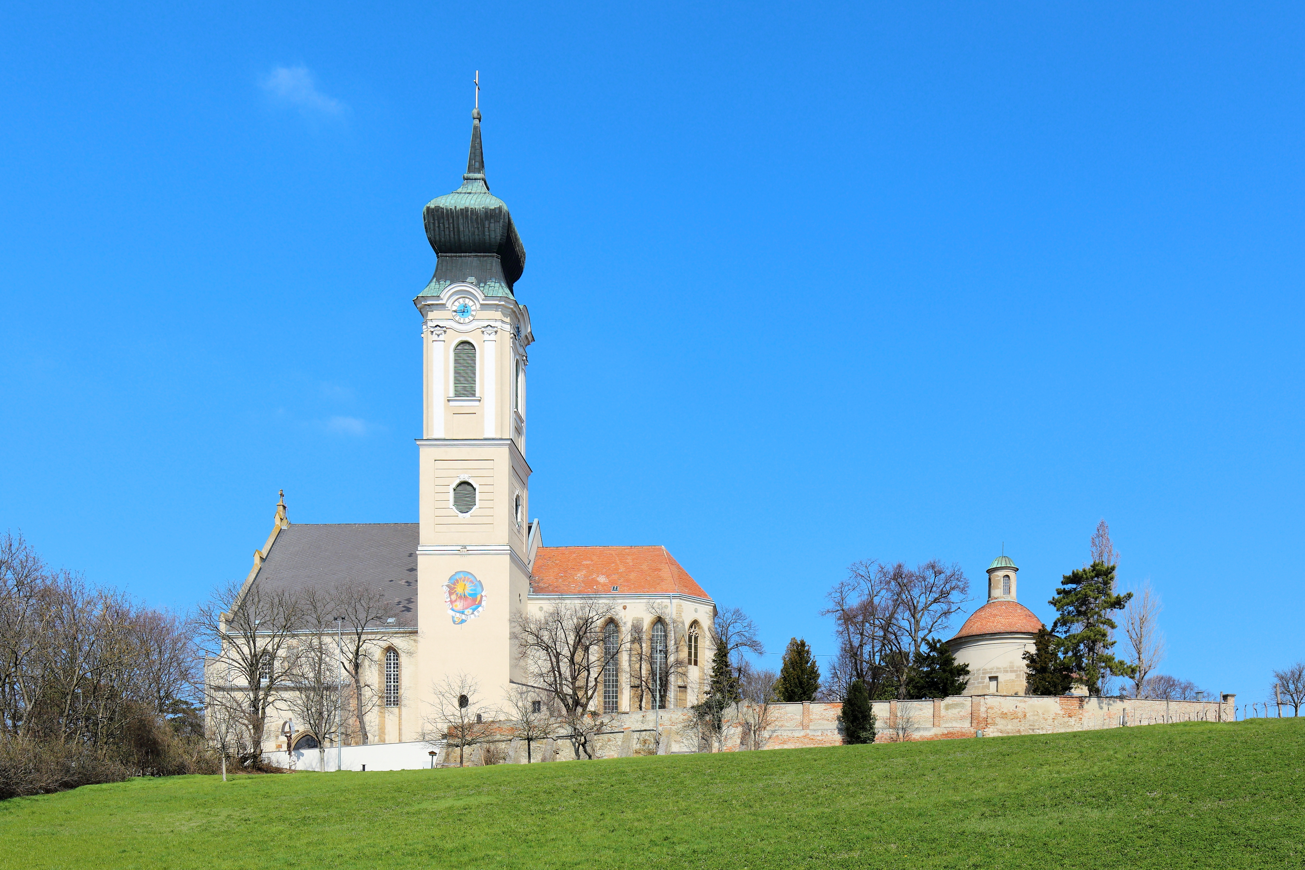 Südansicht der römisch-katholischen Pfarrkirche hl. Martin in der niederösterreichischen Bezirkshaupstadt Mistelbach mit Friedhofsmauer und dem ehemaligen Karner.Die spätgotische Hallenkirche mit eingezogenem Chor und einem in den Obergeschossen barockisierten Südturm wurde östlich des Ortes auf einem Plateau errichtet. Südöstlich der Kirche befindet sich ein schlichter romanischer Karner mit halbkreisförmiger Apsis aus dem Anfang des 13. Jahrhunderts. Der Karner wurde 1719 barockisiert und wird heute als Kapelle hl. Katharina genutzt.